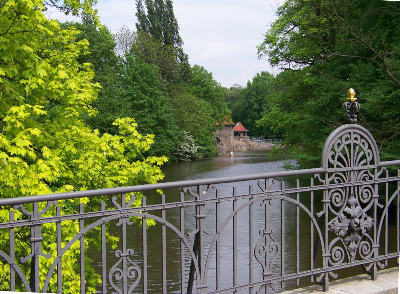 Blick von der Klingerhainbrücke über die Weiße Elster zum Palmengartenwehr in Leipzig.